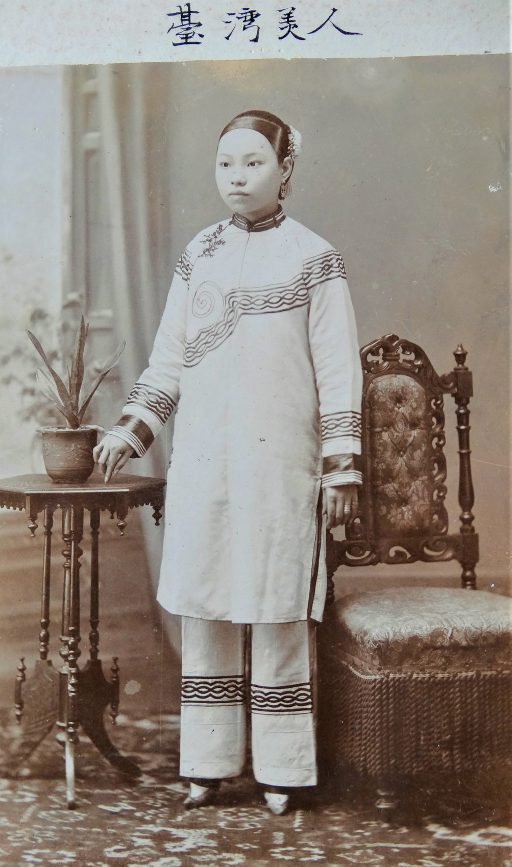 圖上標有「𦥄灣美人」（「𦥄」是「臺」的異體字）